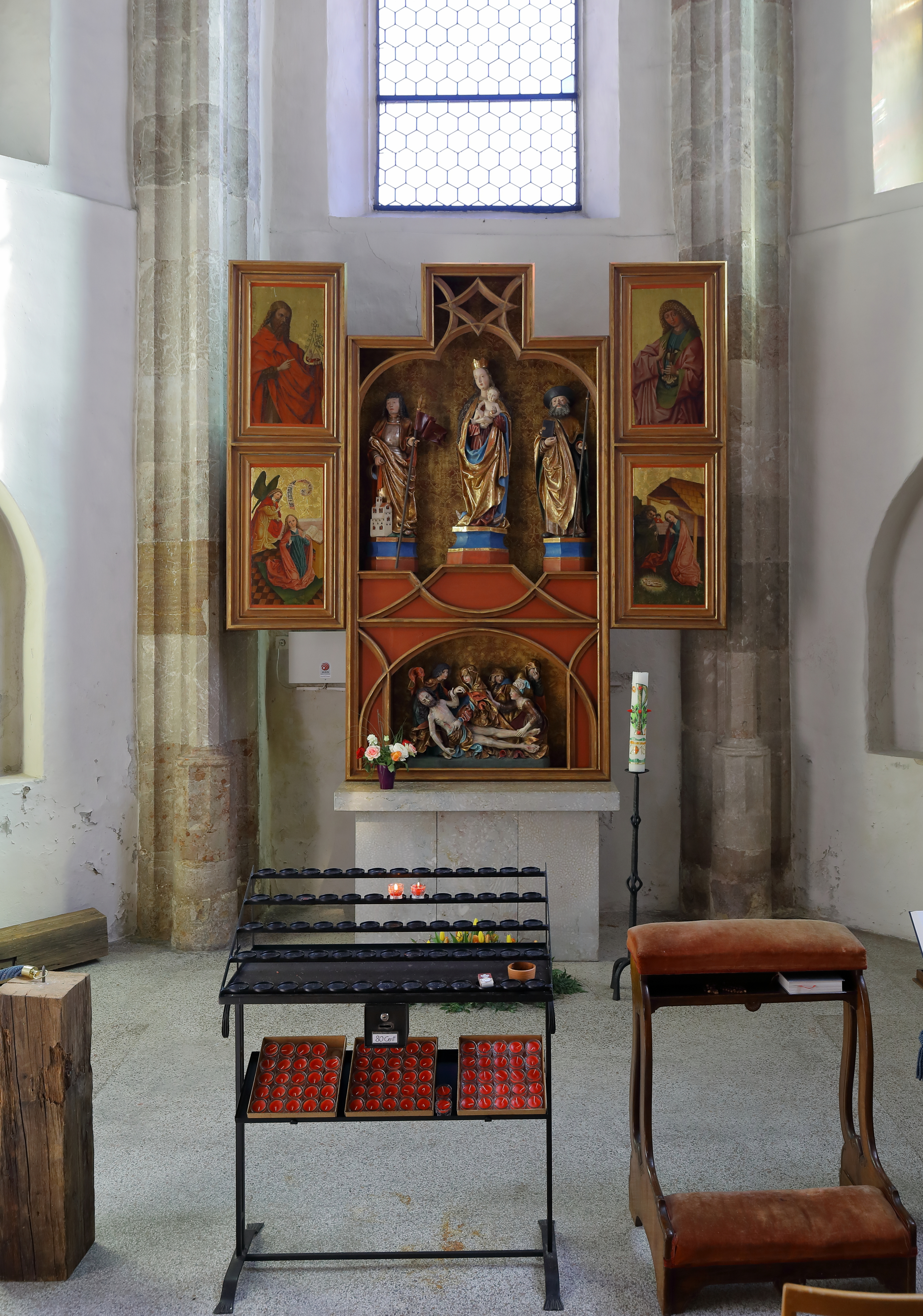 Altar der Marienkapelle im alten Chorraum der röm.-kath. Pfarrkirche hl. Martin in der oberösterreichischen Marktgemeinde Bad Goisern.Ursprünglich eine spätgotische Kirche aus dem Ende des 15. Jahrhunderts. 1835/37 erfolgte ein Neubau unter Einbeziehung der alten Kirche. Dabei wurde die Hauptachse der Kirche im rechten Winkel gedreht und der Chor der alten Kirche zu einer Seitenkapelle (Marienkapelle) umgestaltet.